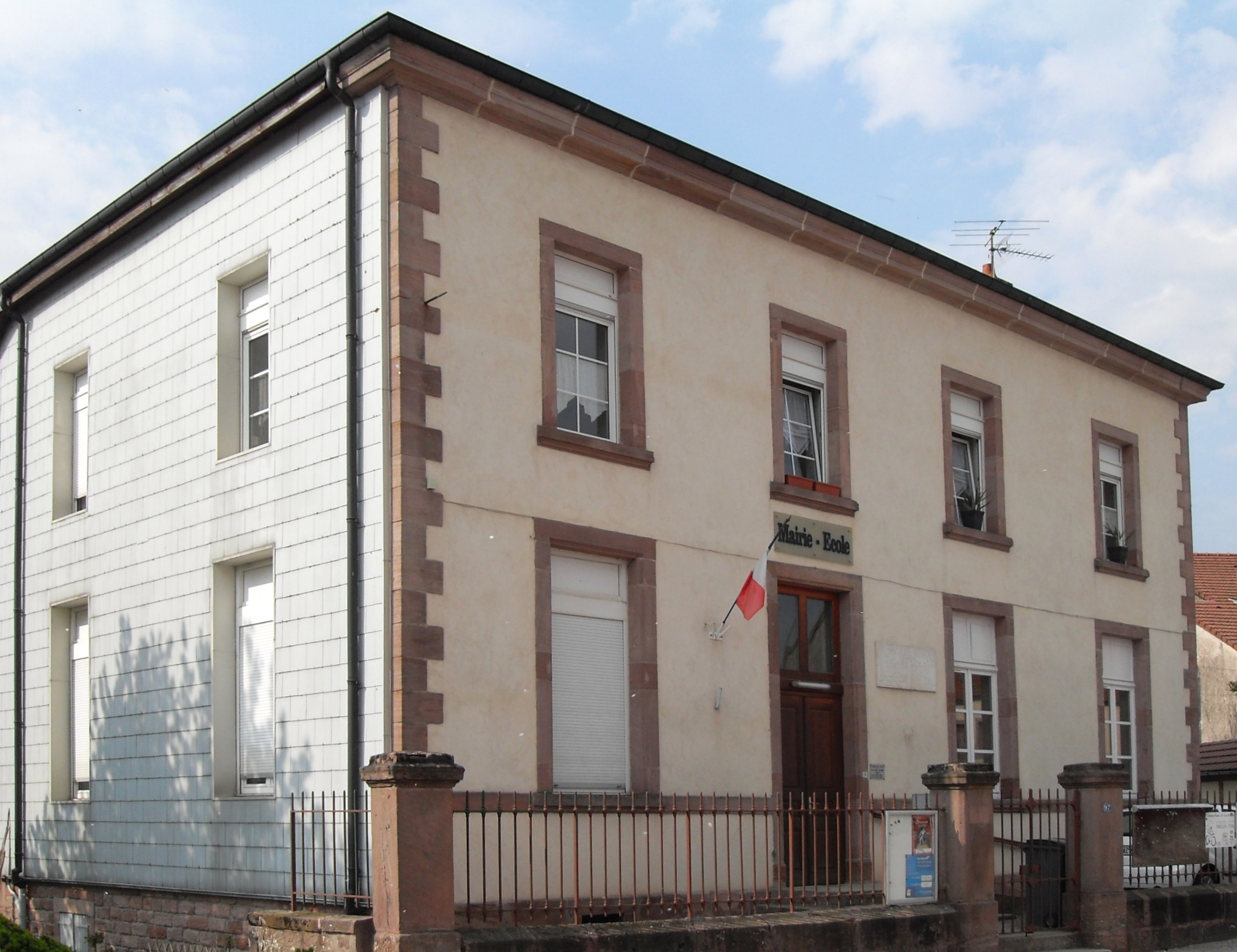 La mairie-école de Fays, Département des Vosges